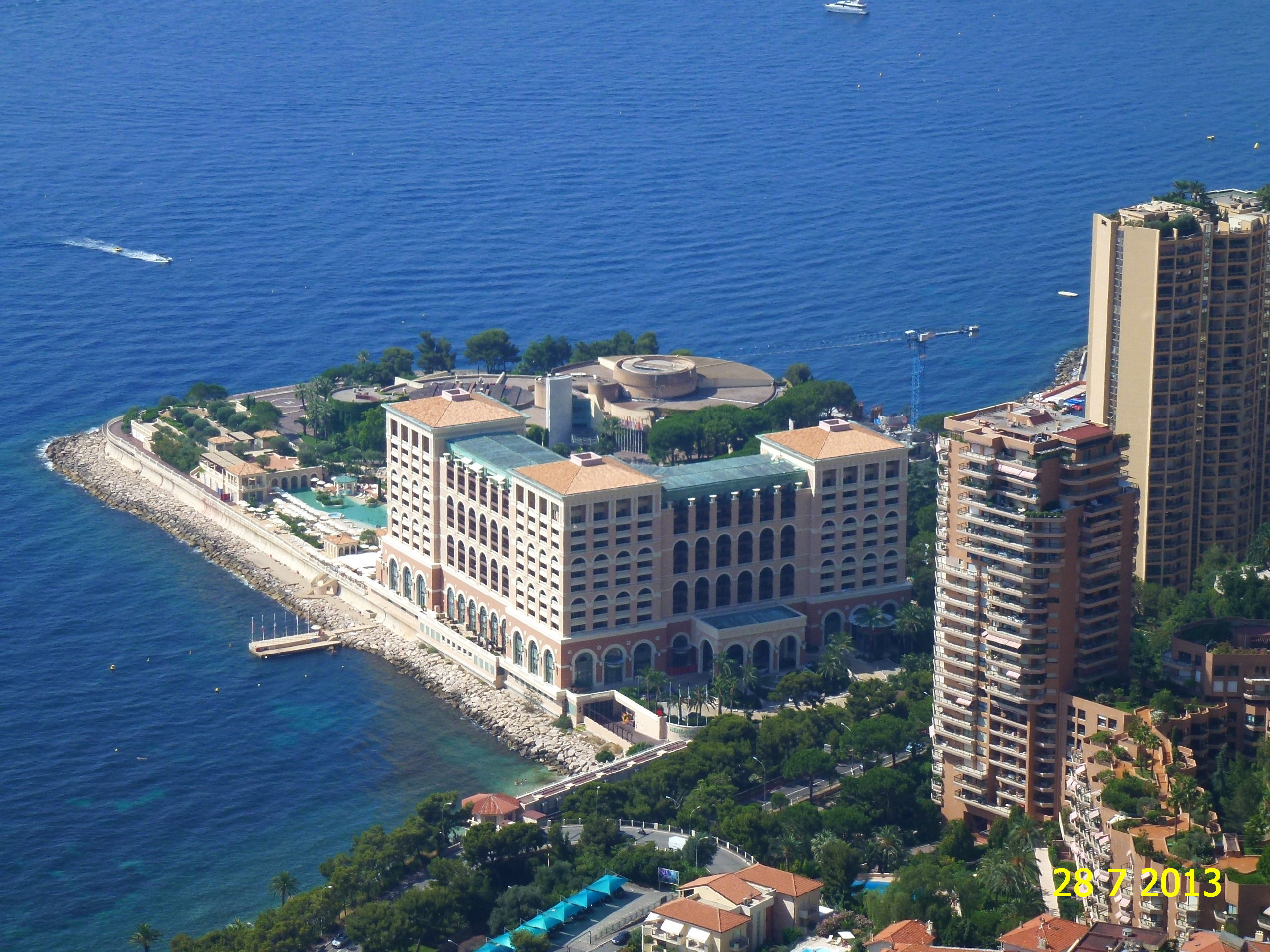 MONACO, JULY 2013.